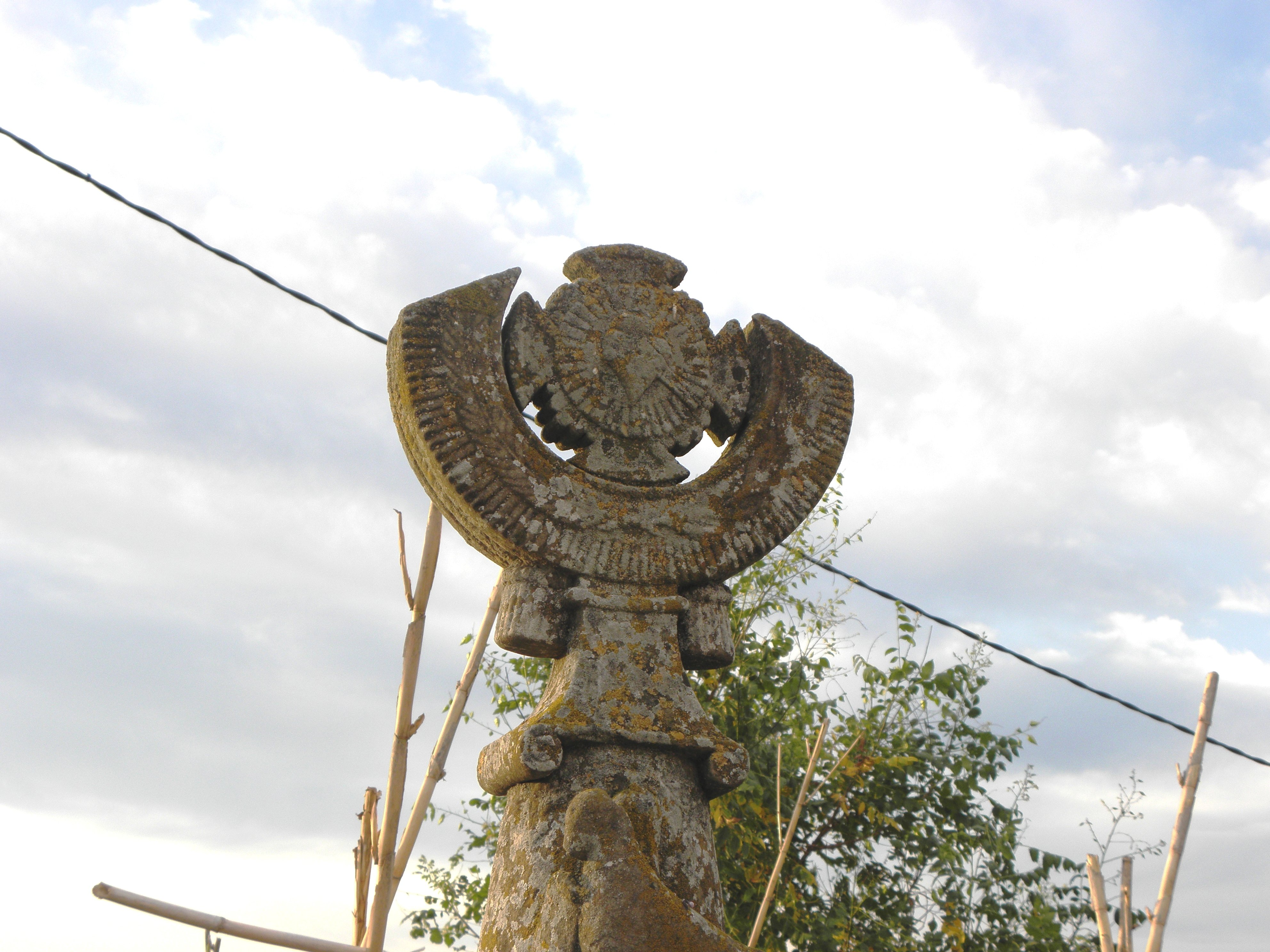 La part superior de la creu de pedra de davant del cementiri vell de Prades de la Molsosa (Solsonès)